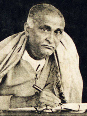 Bhaktisiddhanta Saraswati editing an article